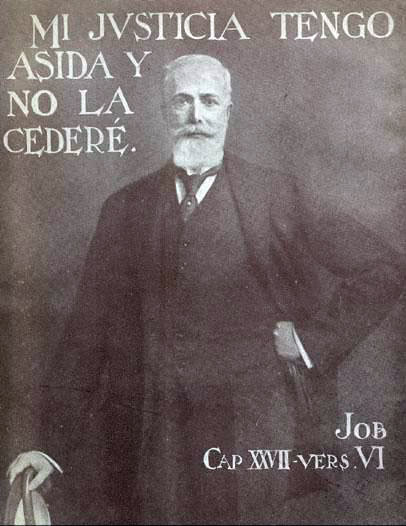 (Joaquín Echeverría Larraín???) Joaquín Alcalde Larraín Político chileno. "Joaquín Alcalde Larraín" es el nombre que aparece en la "source"